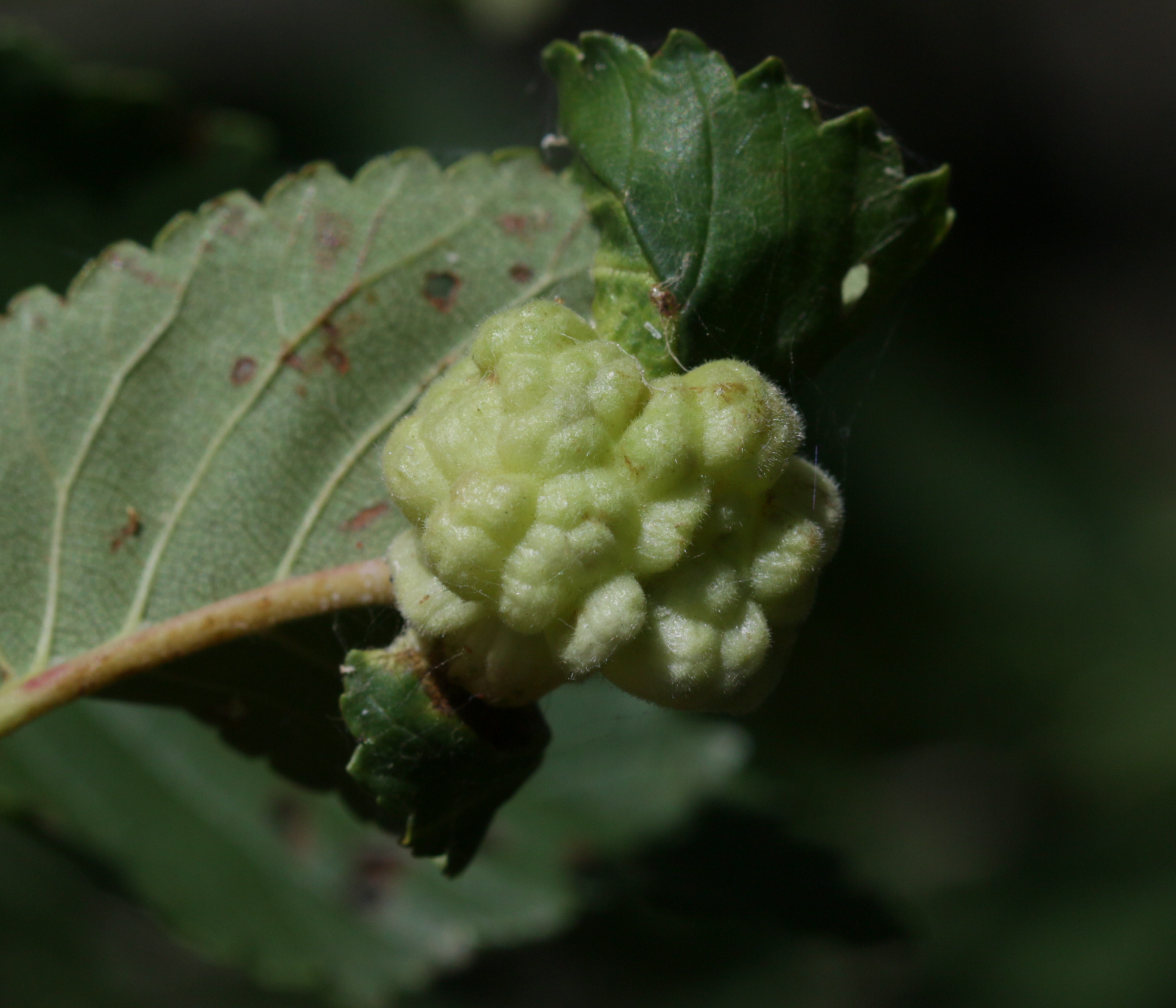 Alcañiz, Aragon, Spain